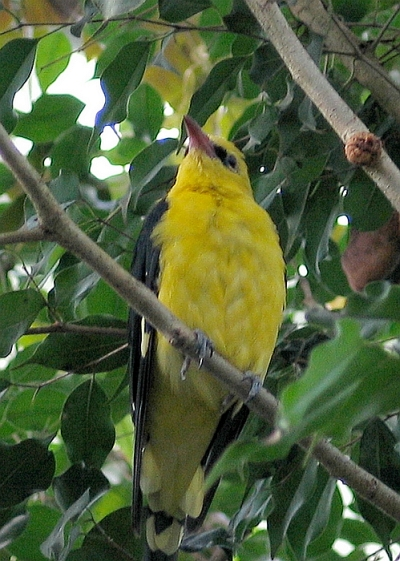 Wilga